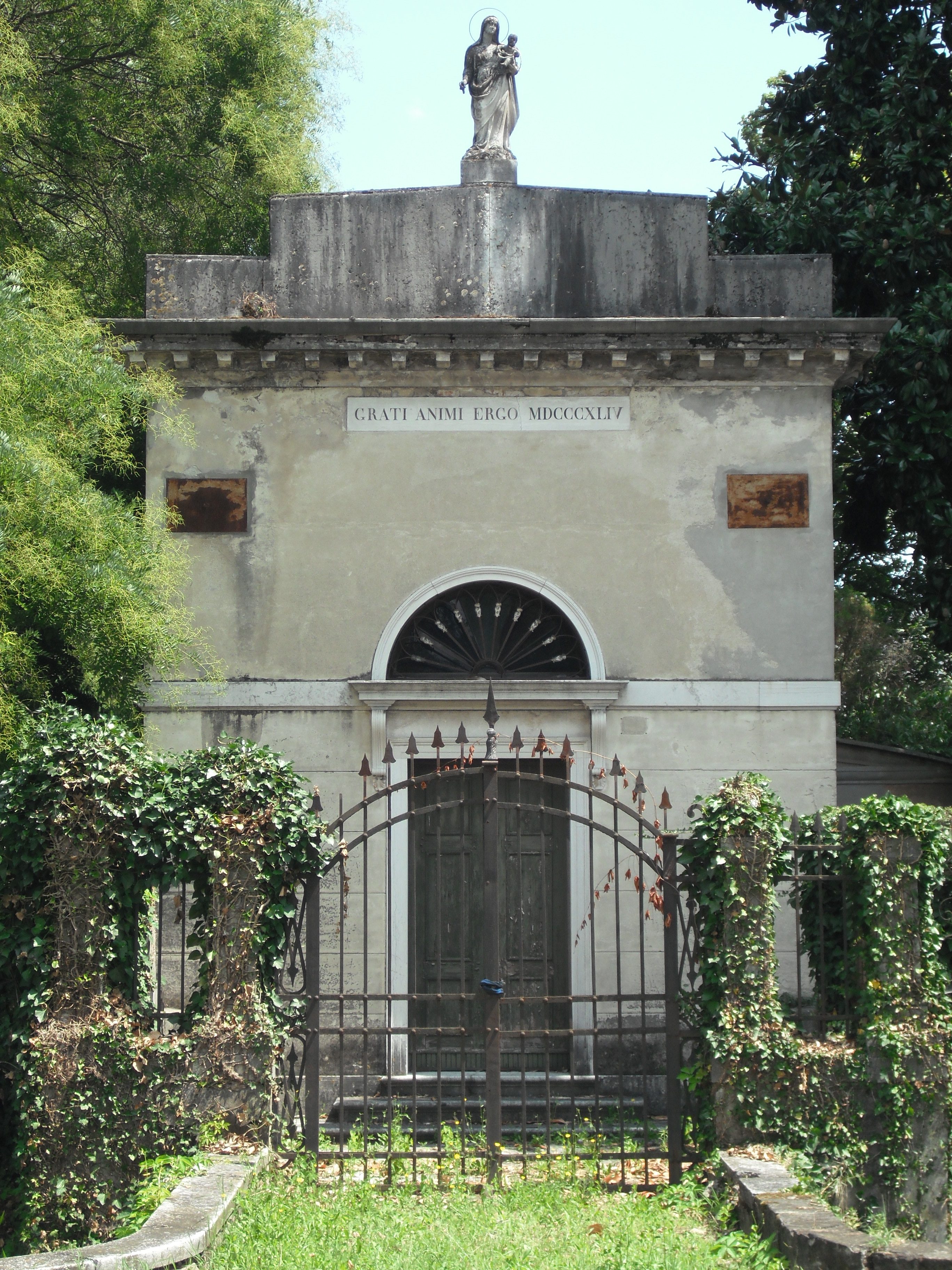 Oratorio della demolita villa Antonini, Mogliano Veneto